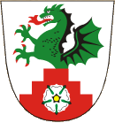 Znak obce Rouské